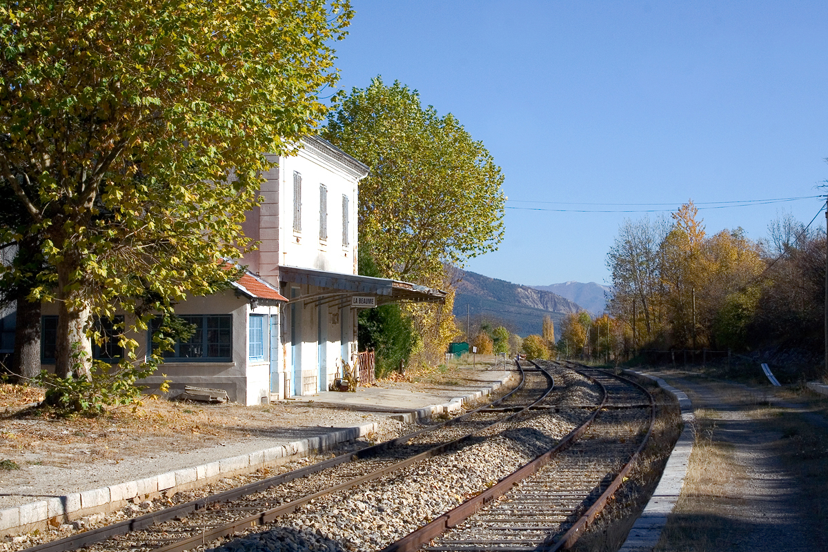 Gare de La-Beaume (France - Hautes-Alpes) - Ligne de Livron à Aspres-sur-Buëch - Commune de La-Beaume